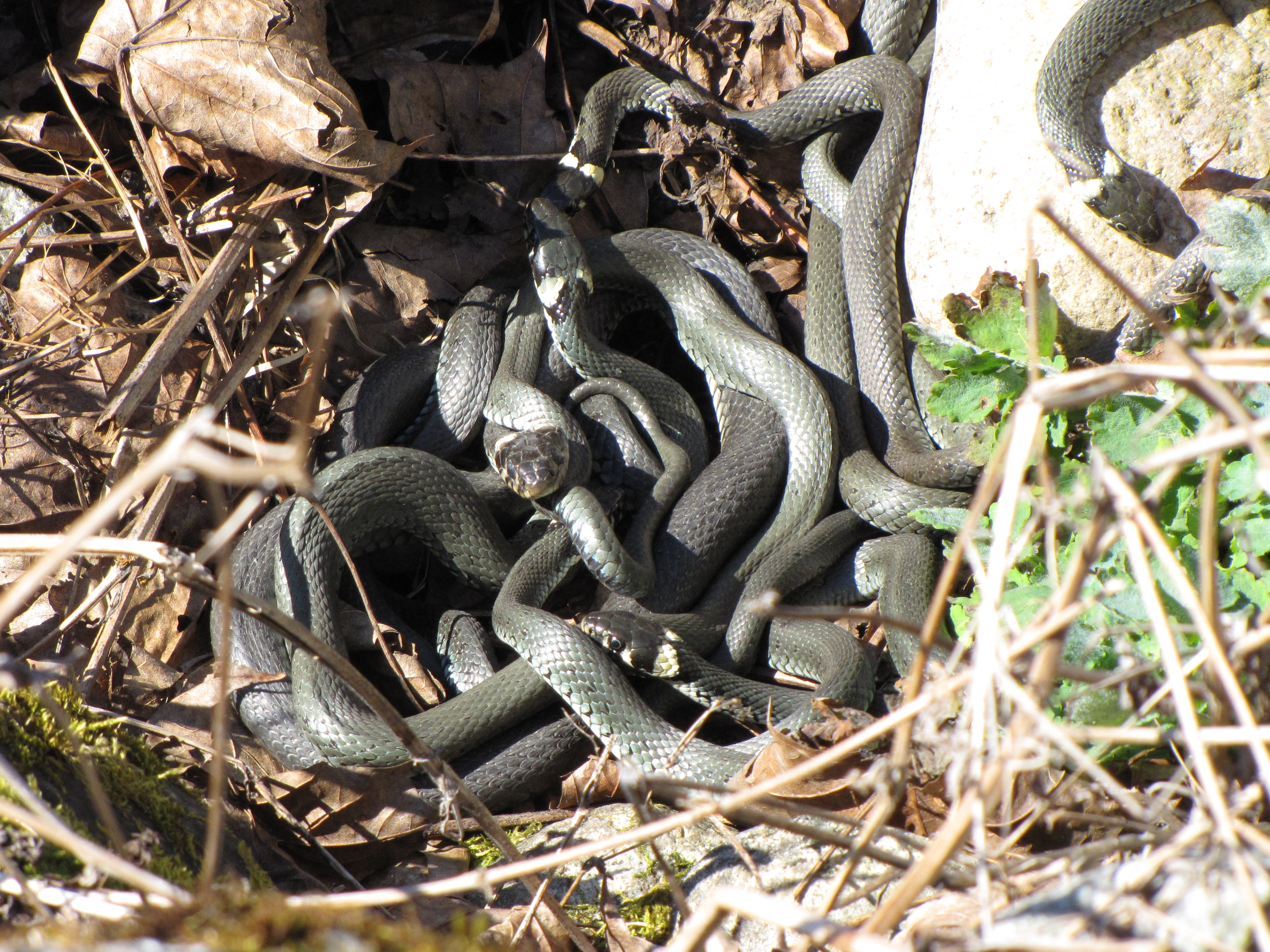 Öby kulle är ett ormreservat vid Kvismaren.